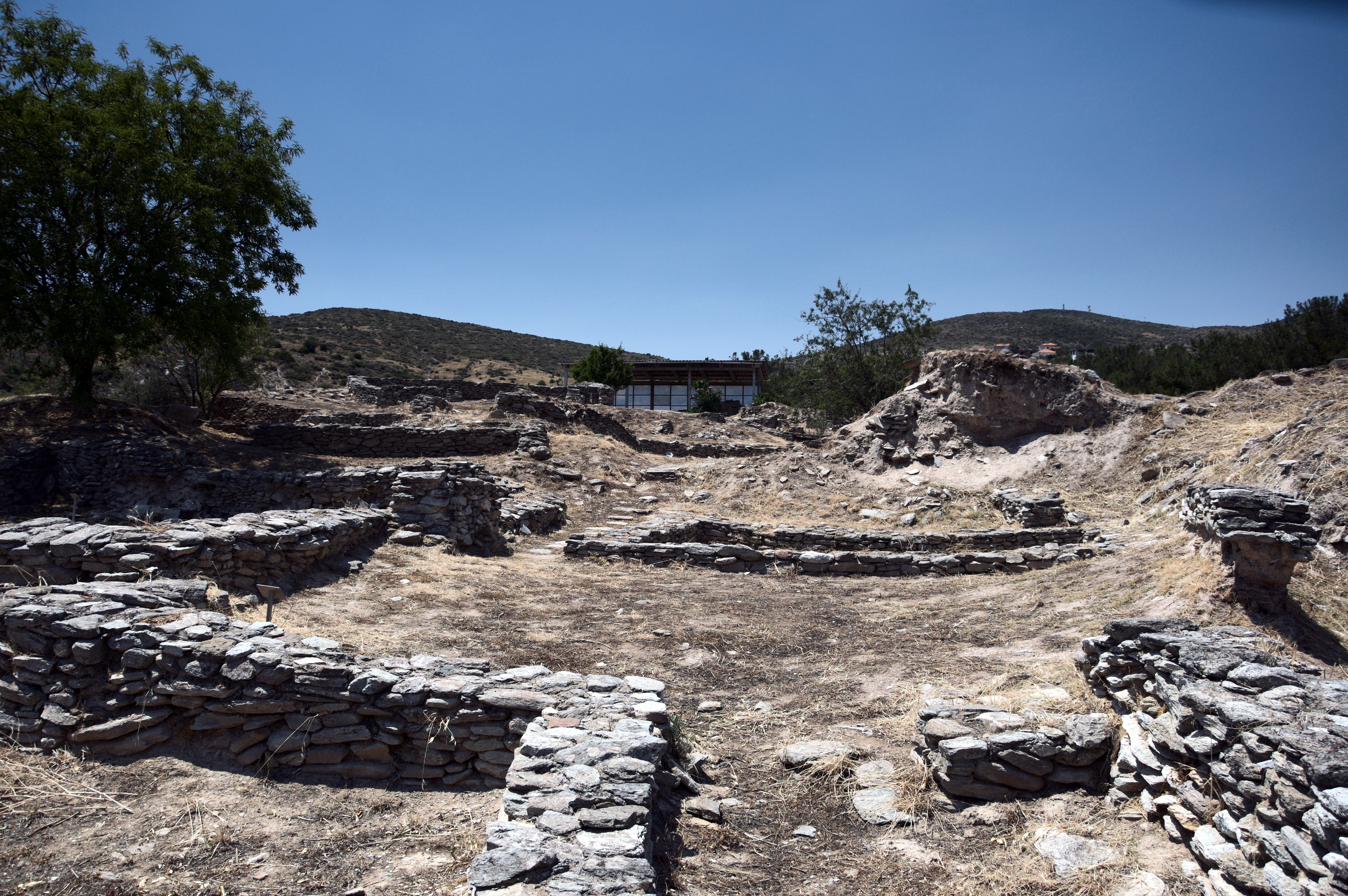 Σέσκλο, γενική άποψη«Σέσκλο»